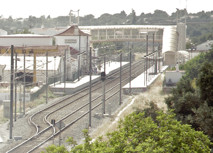 Ferreiras [Linha do Algarve, PK 307] Data e hora: 2 de Julho de 2011 [17h39]